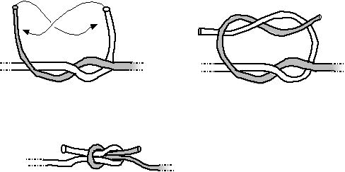 Réalisation d'un noeud plat